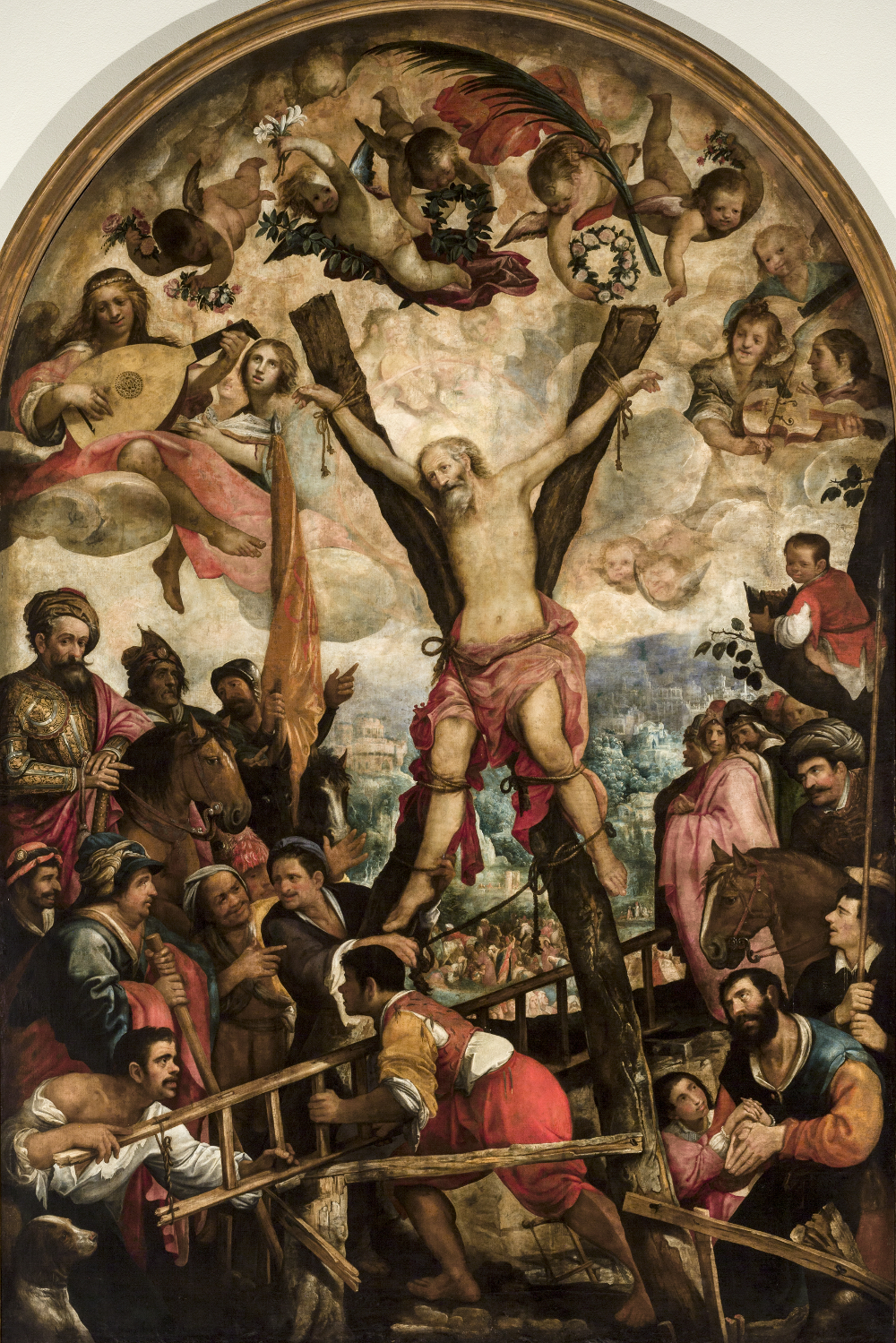 El lienzo representa el martirio del apóstol San Andrés, y es una obra llena de dinamismo en la que el mártir se halla en el centro. El santo está atado por ligaduras en los brazos y en las piernas y en su rostro muestra una expresión resignada, aceptando el destino que le aguarda.